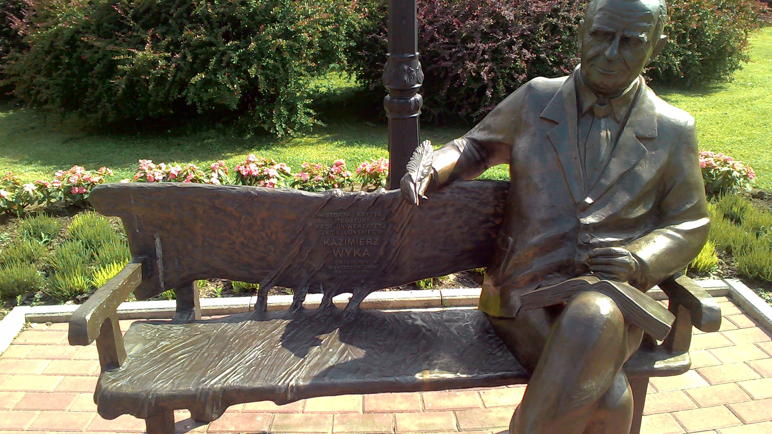 K. Wyka